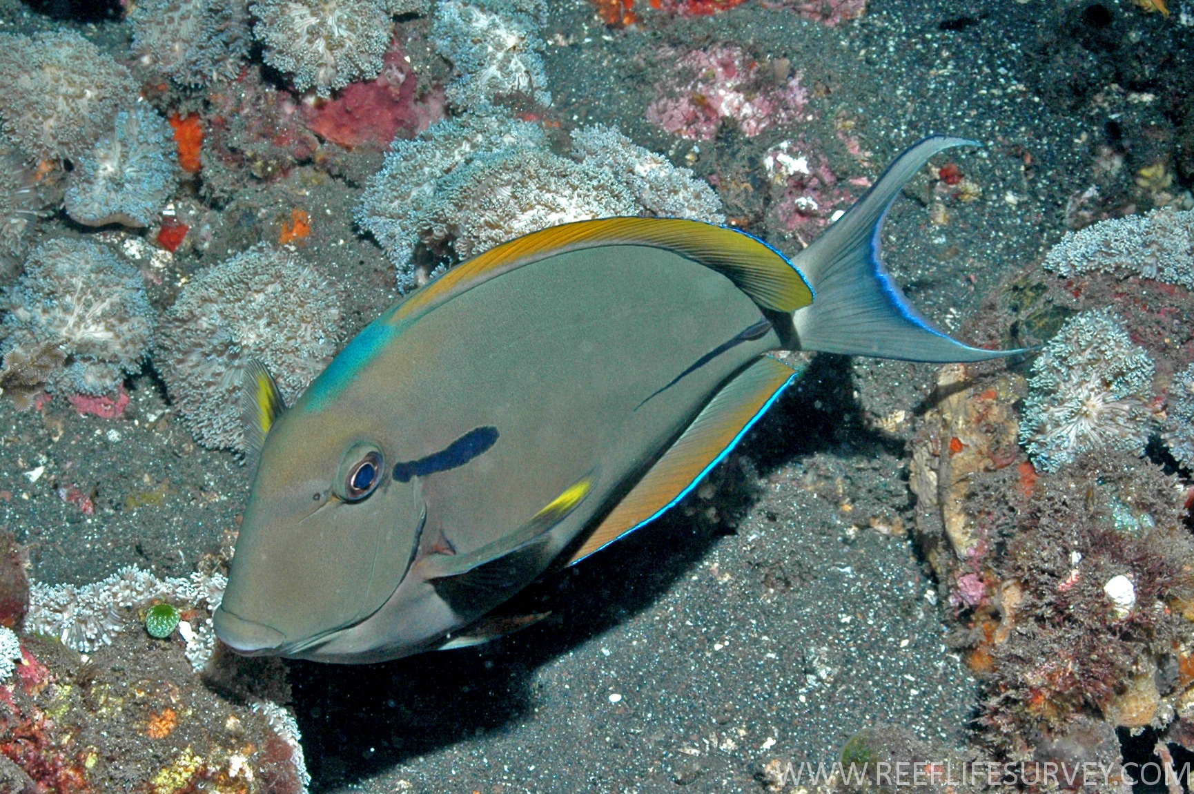 Acanthurus nigricauda enTulamben, Bali